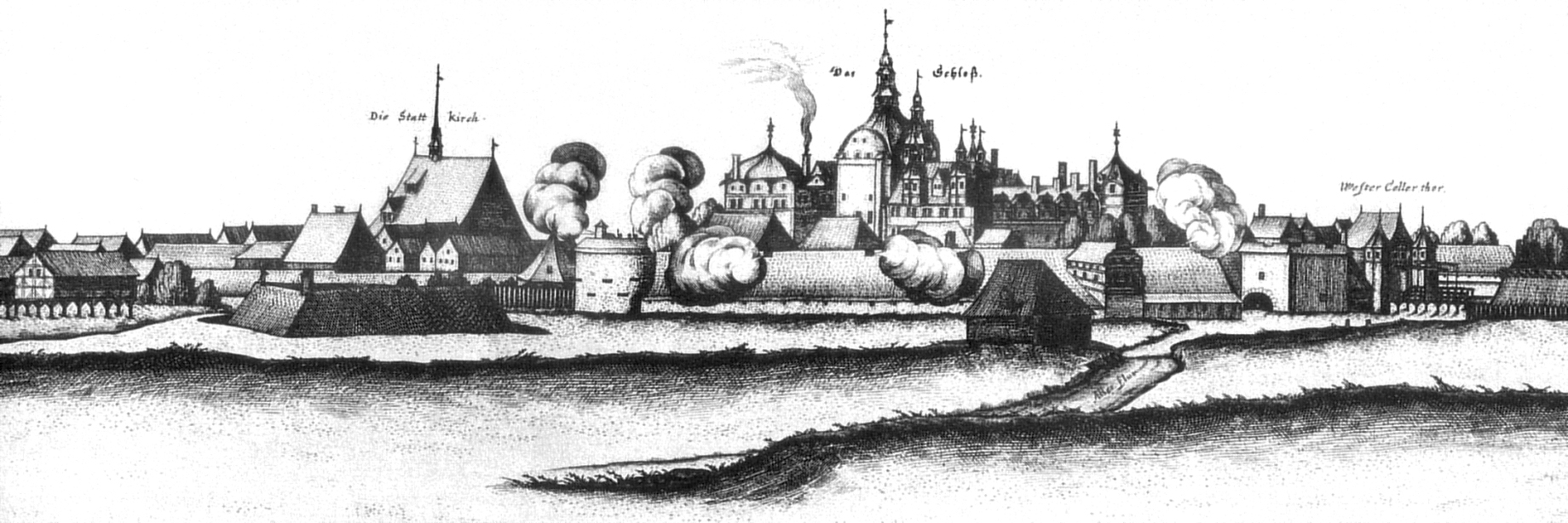 Celle von Nordwesten, in der Mitte das Schloss Celle mit seinem Wall. Aus den Bastionen steigt Pulverdampf auf von den Salutschüssen aufgrund der Begräbnisse der Herzöge Georg und Wilhelm.